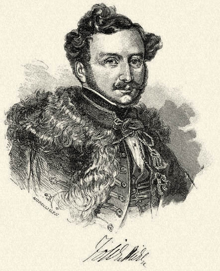 Jósika Miklós (1794–1865) író. Morelli Gusztáv fametszete. Megjelent Az Osztrák-Magyar Monarchia írásban és képben (1887–1901) kiadványban